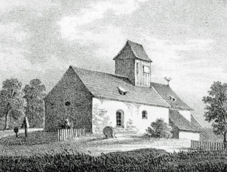 Die Dorfkirche in Albrechtshain vor 1844